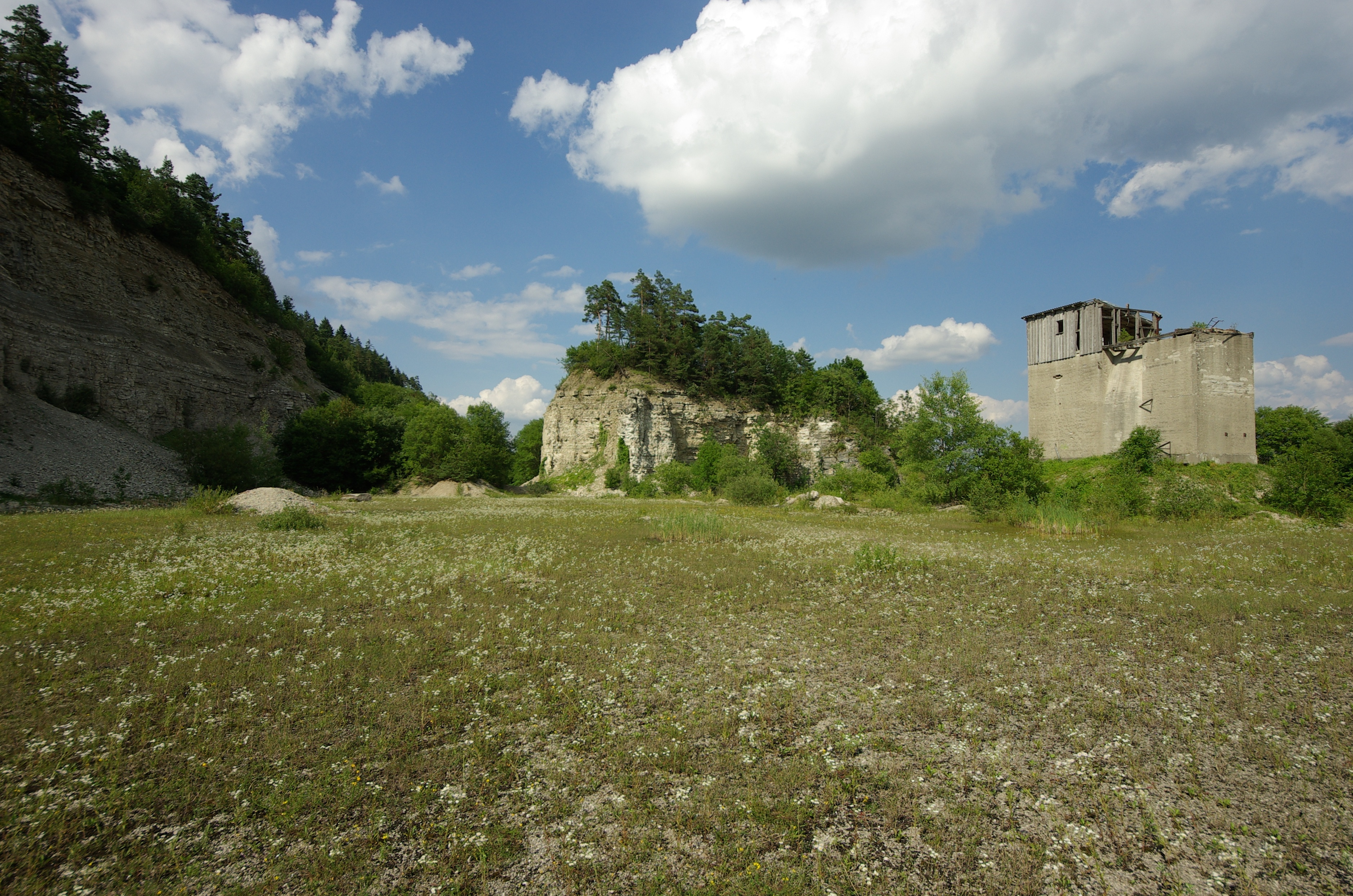 Ehemaliger Steinbruch unterhalb der Burg Feuerstein bei Ebermannstadt